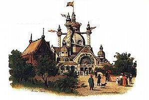 photos, sweden, advert for 1897